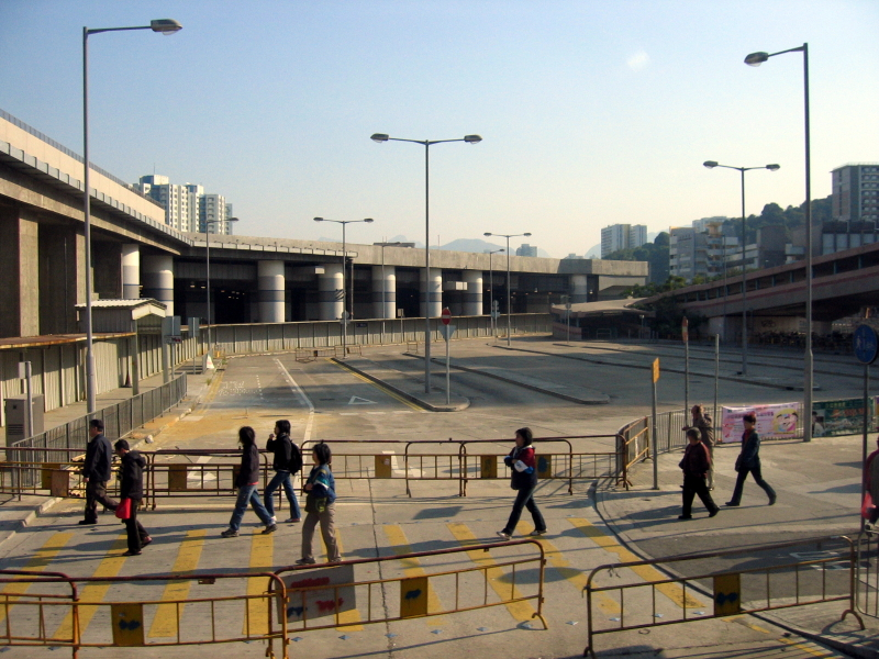 Tai Wai Station Bus Terminal